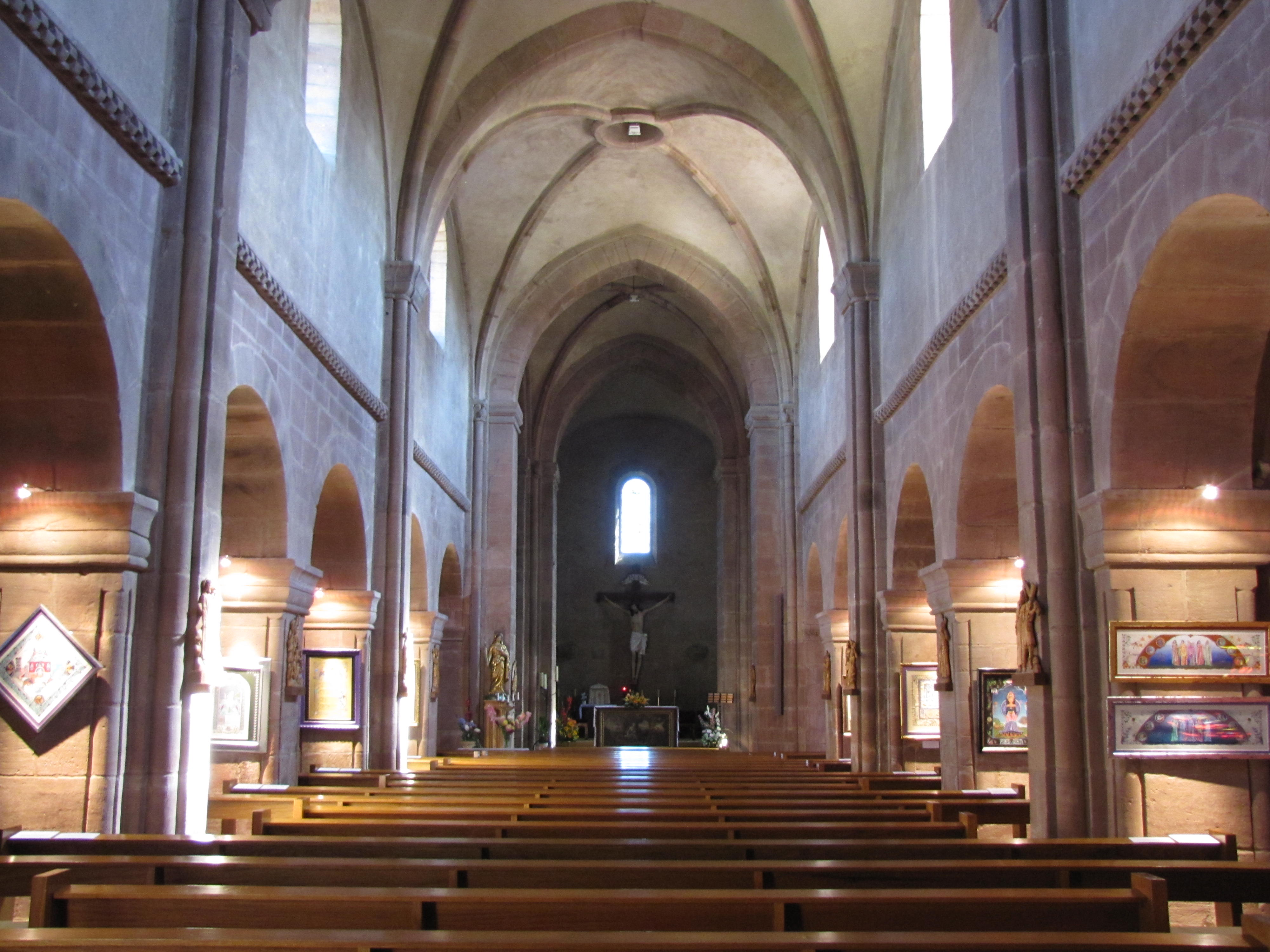 Alsace, Haut-Rhin, Église Saints-Pierre et Paul de Sigolsheim (PA00085675, IA68003965): Vue intérieure de la nef.